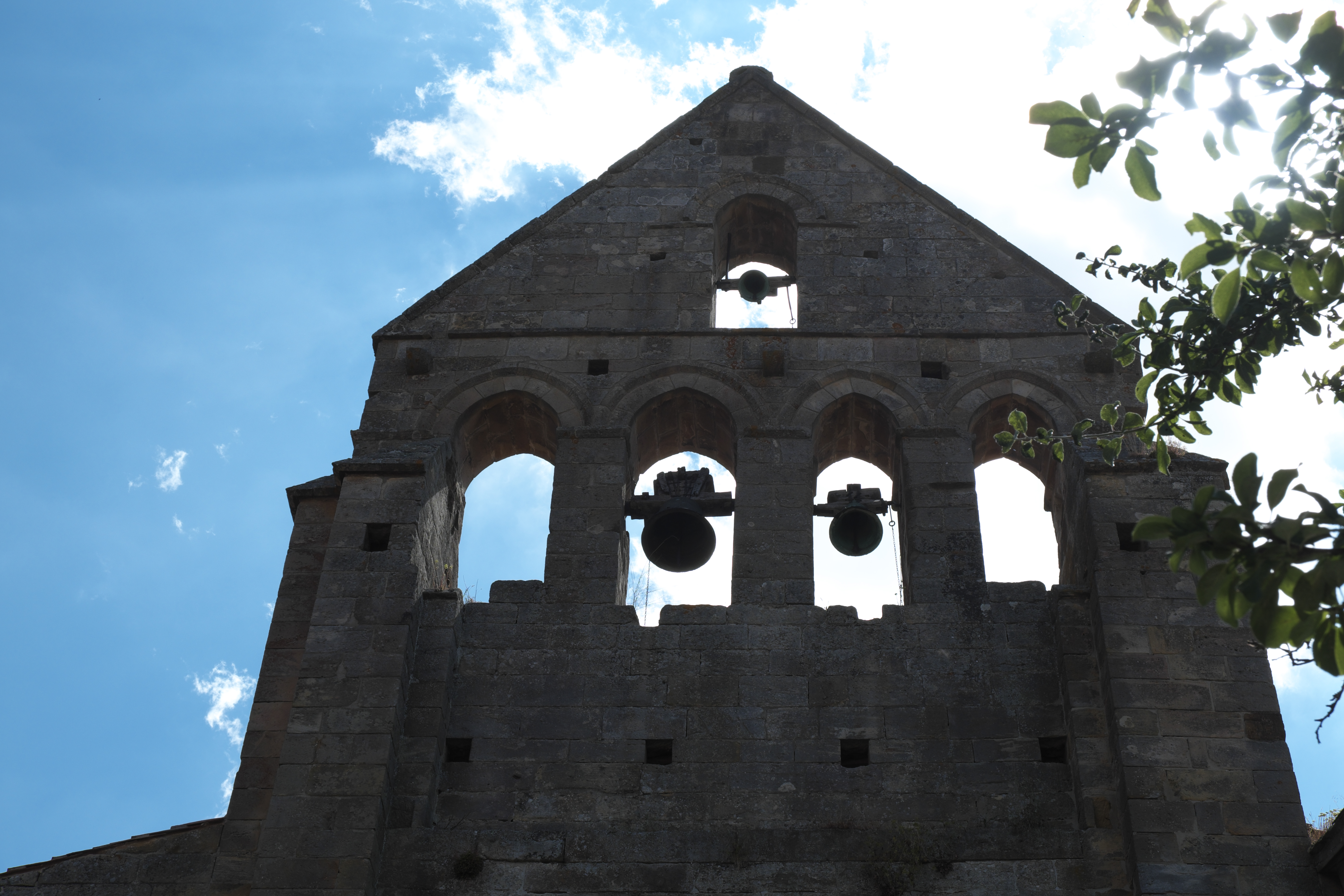 Glockenturm der Kirche des ehemaligen Prämonstratenserklosters Santa María la Real in Aguilar de Campoo in der Provinz Palencia (Kastilien-León/Spanien)